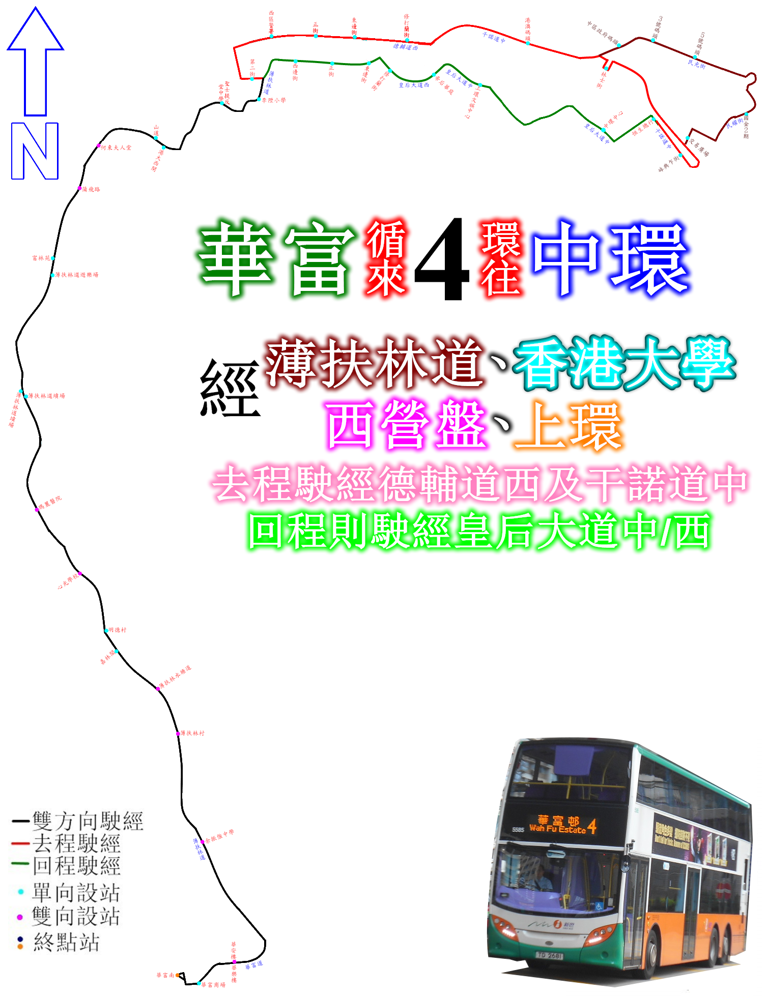 中文（香港）: 新巴4號線的走線圖